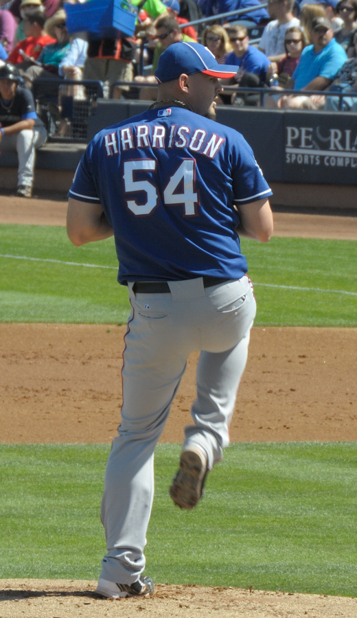 Matt Harrison